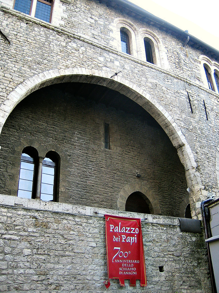 Anagni, Lazio, Italia